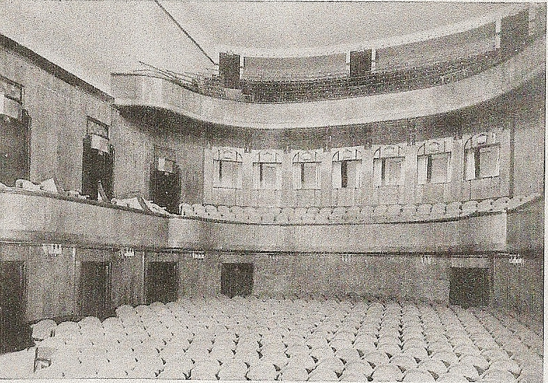 Der Zuschauerraum des Hebbel-Theaters in Berlin im Jahre 1908.